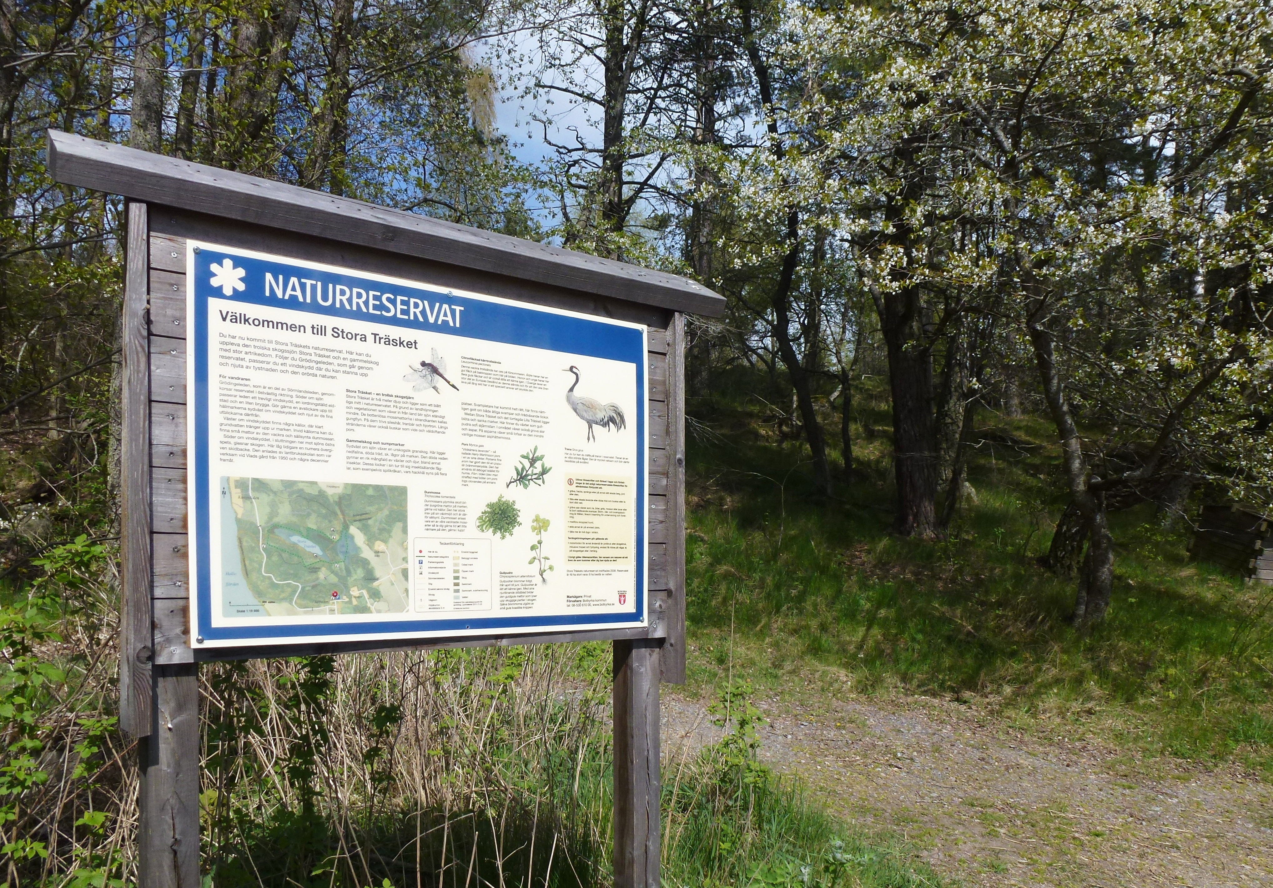 Stora Träsket naturreservat, skylt